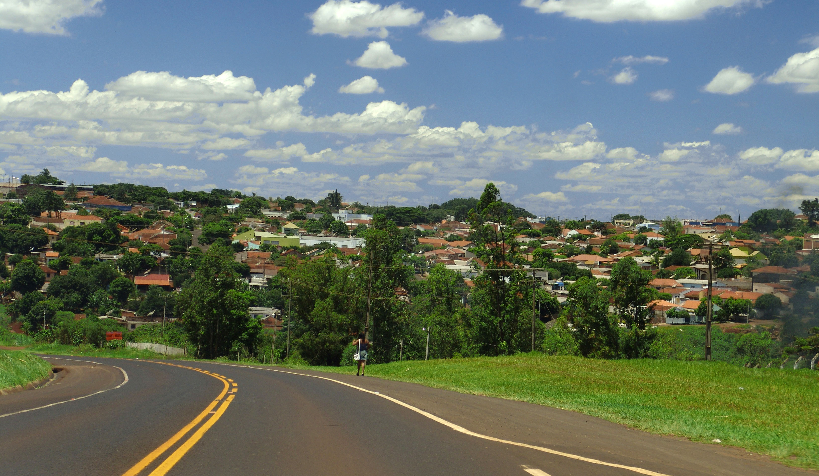 Vista de Andirá